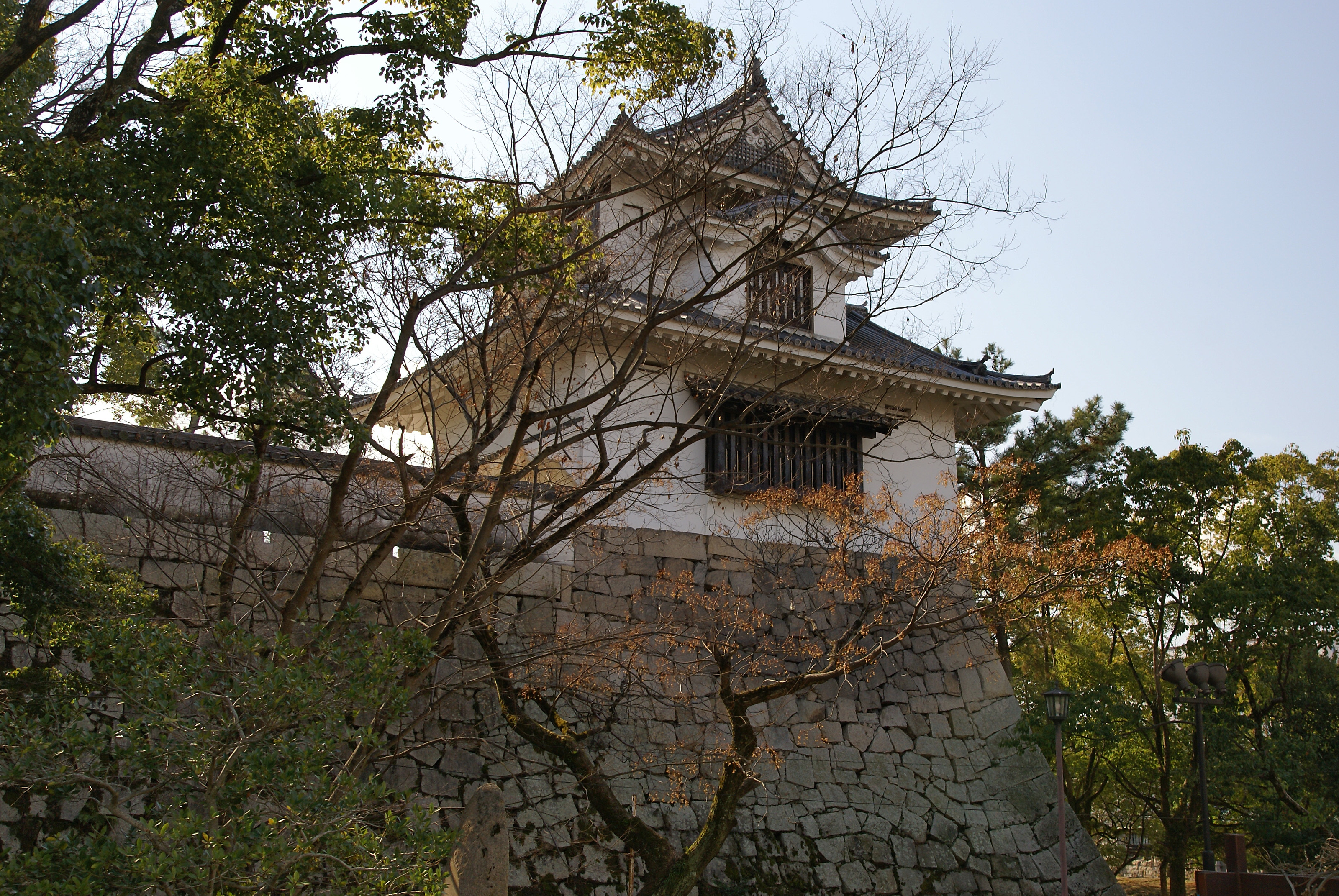 Okayama Castle in Okayama, Okayama prefecture, Japan